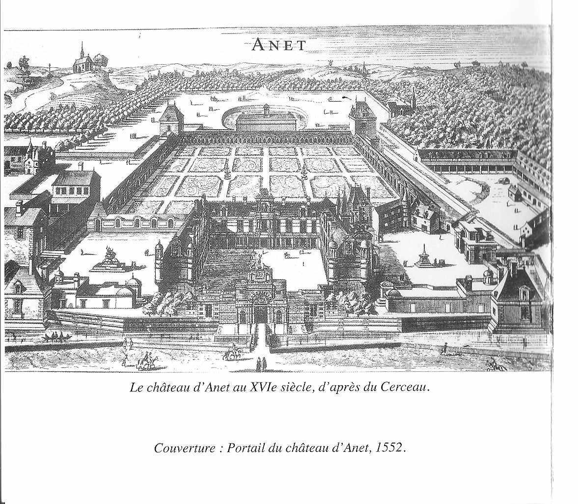 croquis du château d'Anet d'après du Cerceau, Eure-et-Loir, France.